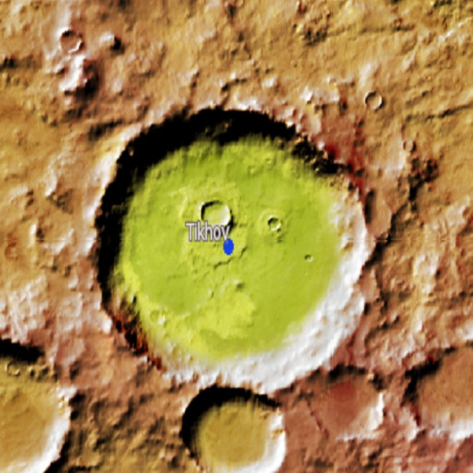 Cráter marciano . (Imagen IAU/USGS/Goddard/A SU/USGS)